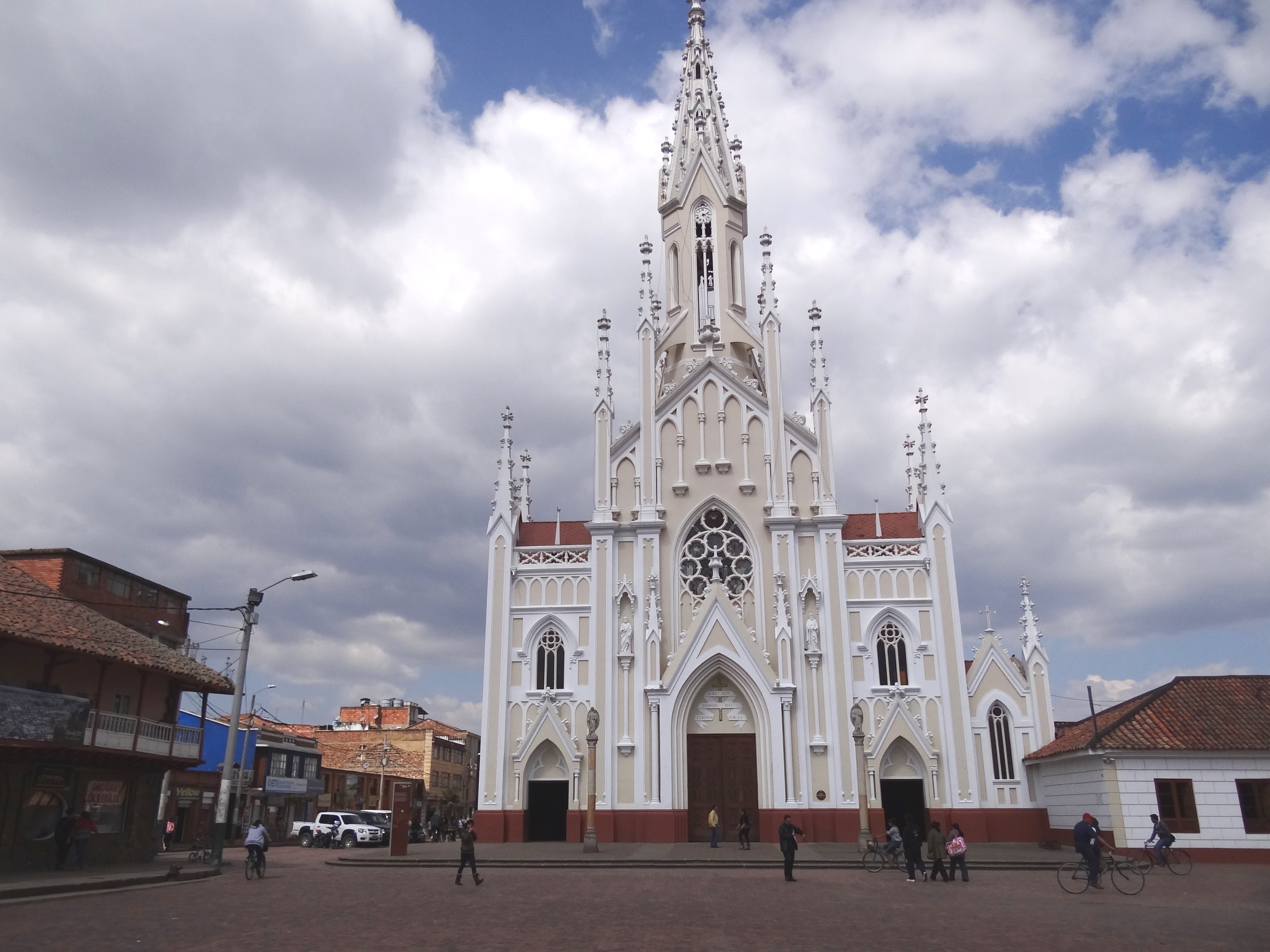 Fachada de la Basílica de Ubaté, departamento de Cundinamarca, Colombia